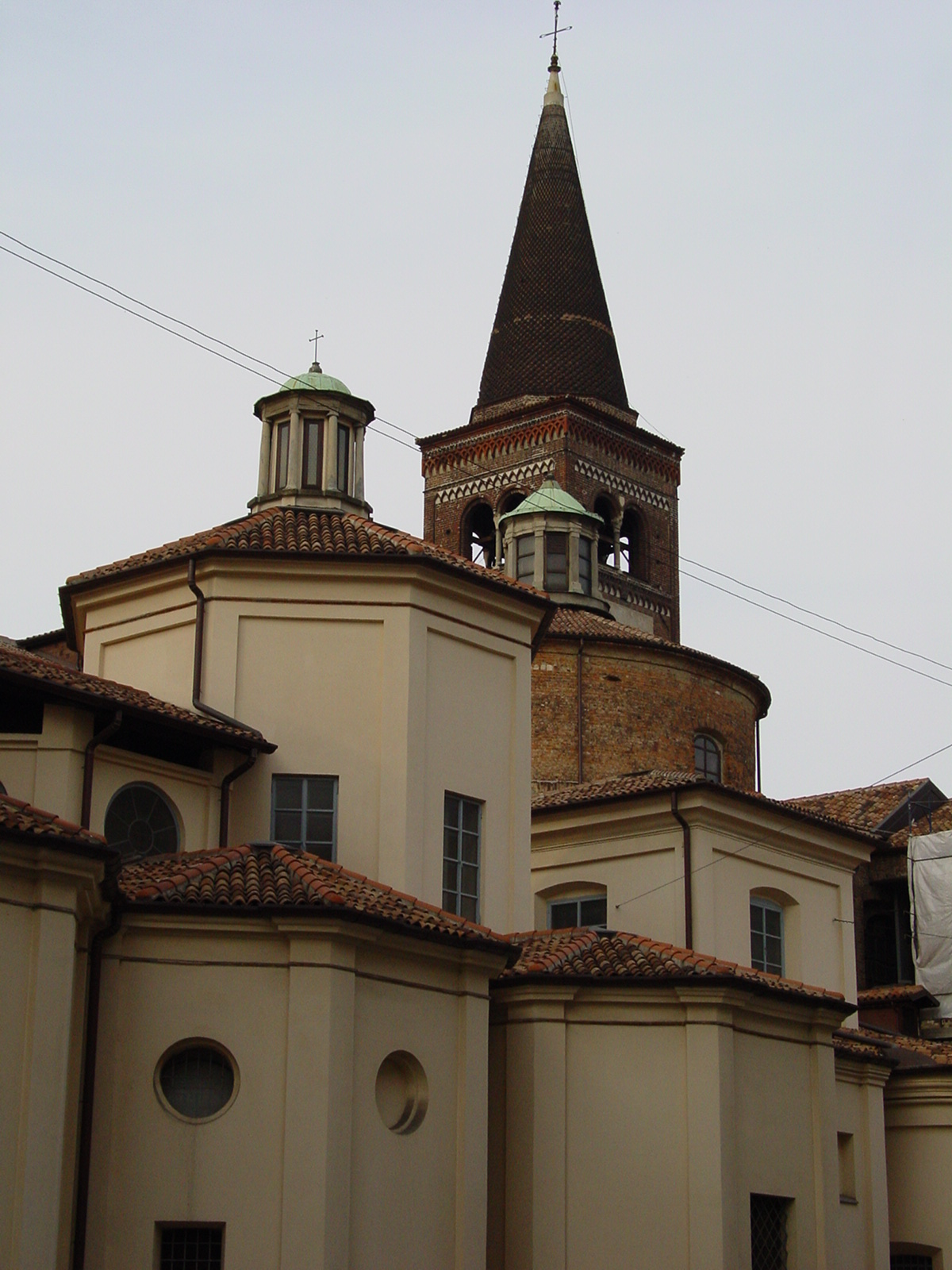 Campanile della chiesa di san Marco a Milano.